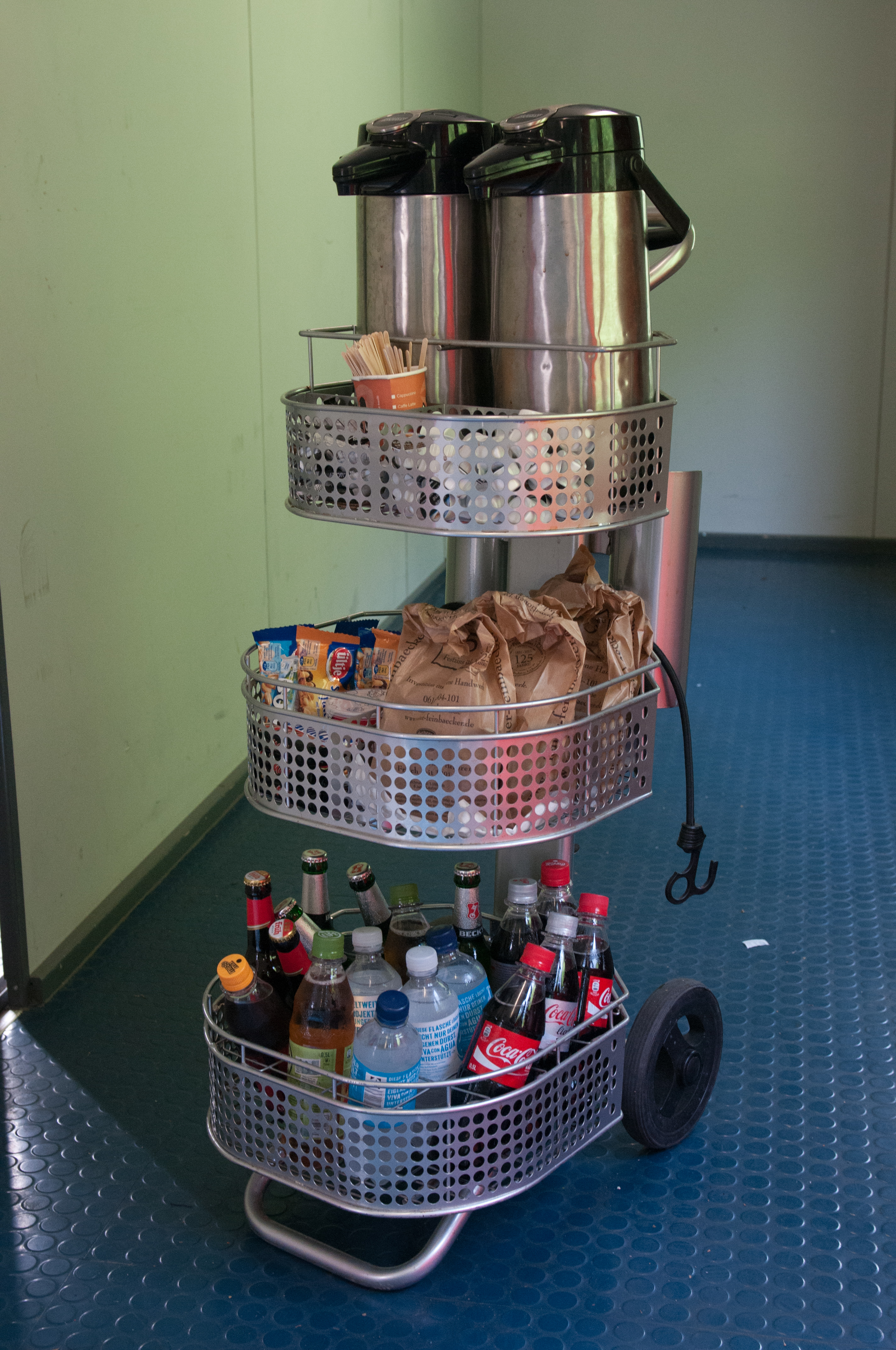 Hamburg-Köln-Express: Mitfahrt am 26. Mai 2016 mit Genehmigung der Pressestelle